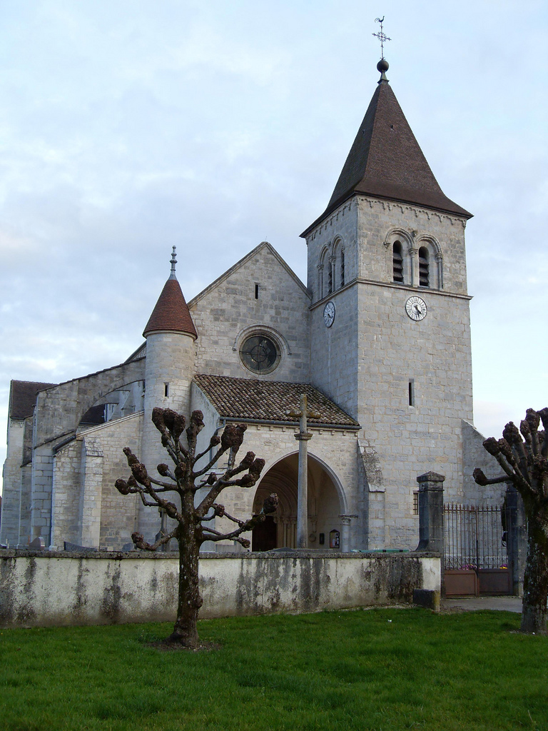 Église de Saint Christophe, Chissey-sur-Loue (Jura, France)